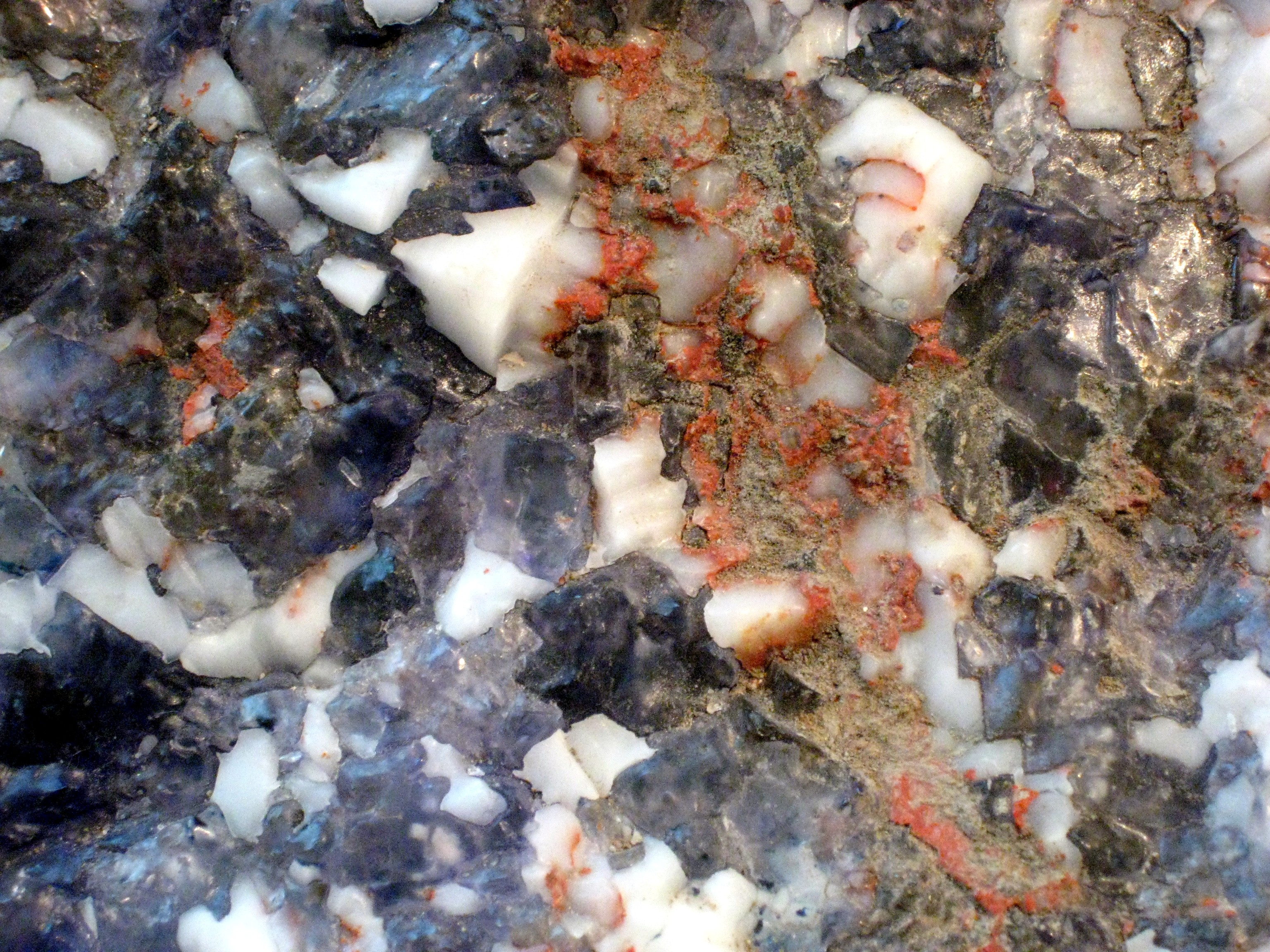 Sylvinite Сильвинит. Верхнекамское месторождение (Пермский край). СКРУ-2 (Соликамск). Дар Н.Н. Санниковой. KCl+NaCL